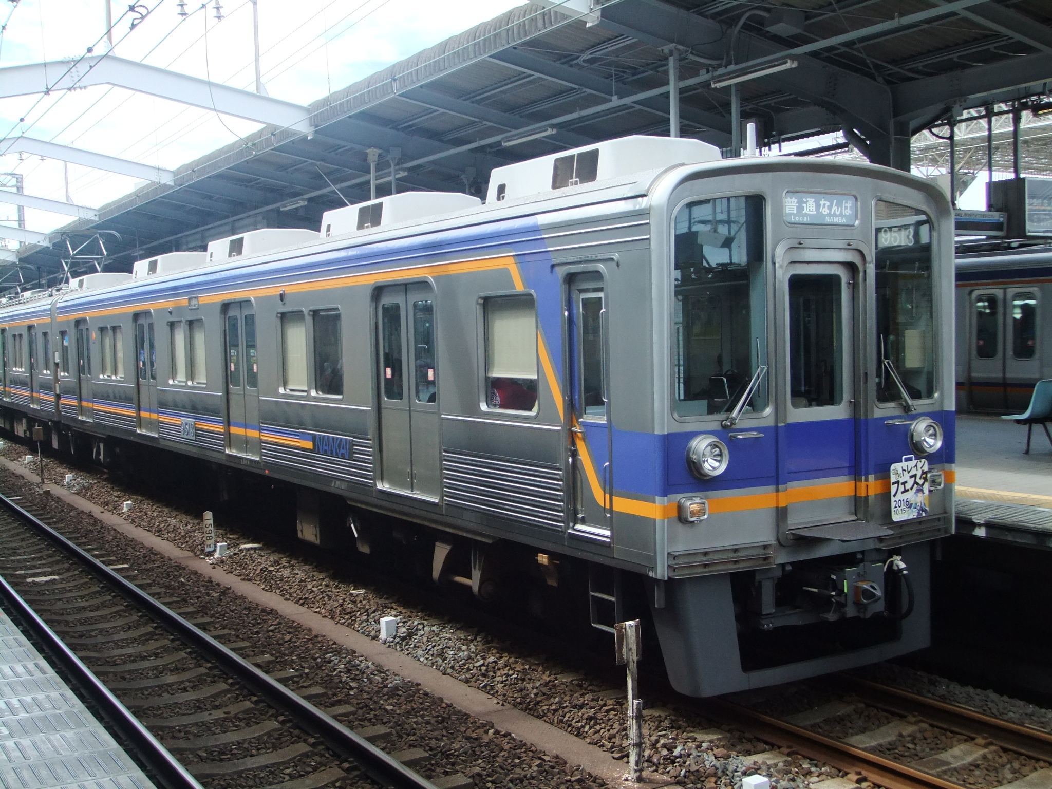 南海9000系 9513 堺駅